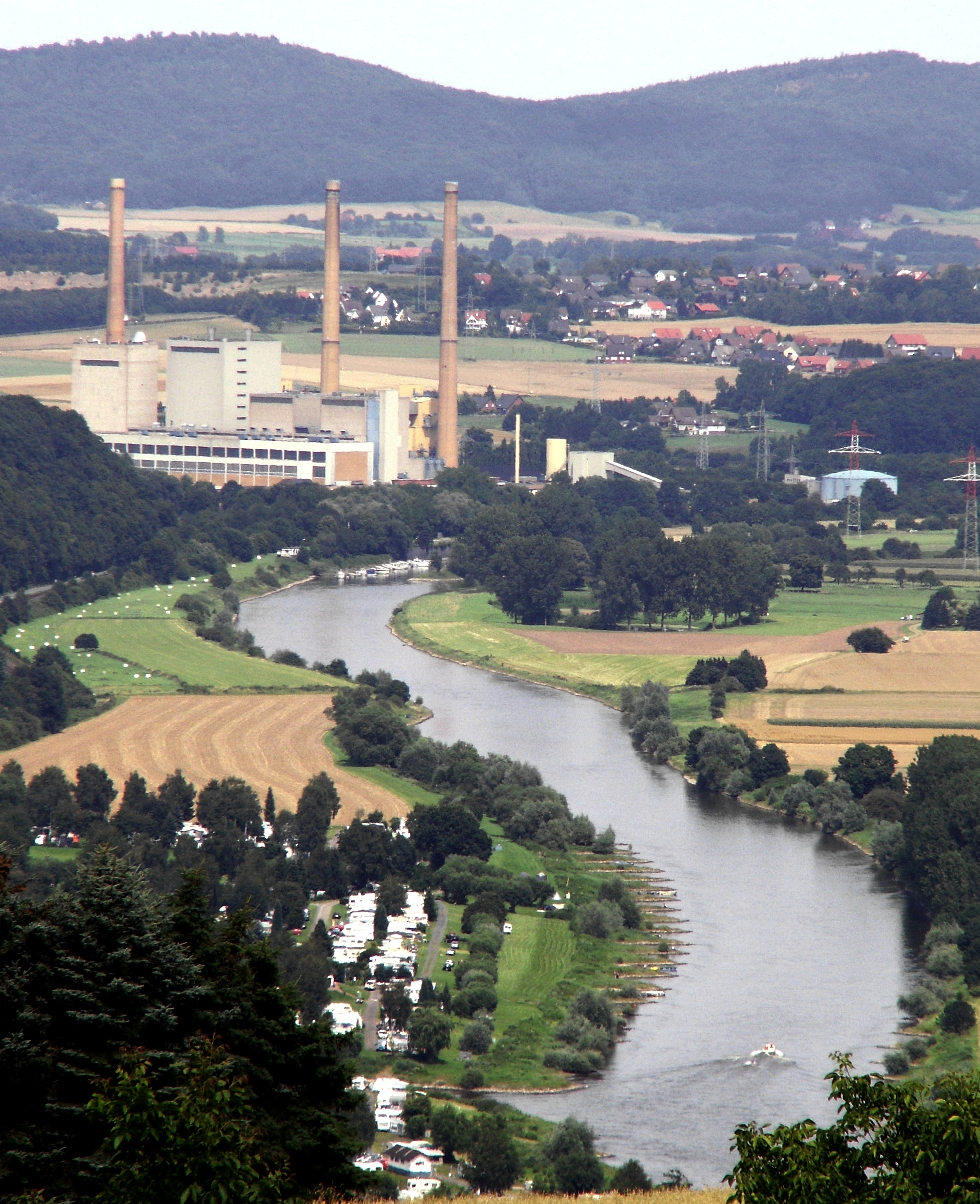 Gemeinschaftskraftwerk Veltheim, im Vordergrund die rechtsseitig der Weser gelegene Freizeitanlage Borlefzen (Vlotho-Uffeln), im Hintergrund das Weserbergland. Direkt vor dem Kraftwerk hat der Weser-Yacht-Club Erder e. V. seinen Hafen mit Vereinsheim. Standort des Fotografen Vlotho, auf dem Winterberg, Nähe Schöne Aussicht. Im Hintergrund das Wesergebirge beim Nammer Kopf. Am rechten Bildrand sind Masten die Weserkreuzung (220 kV) zu erkennen.